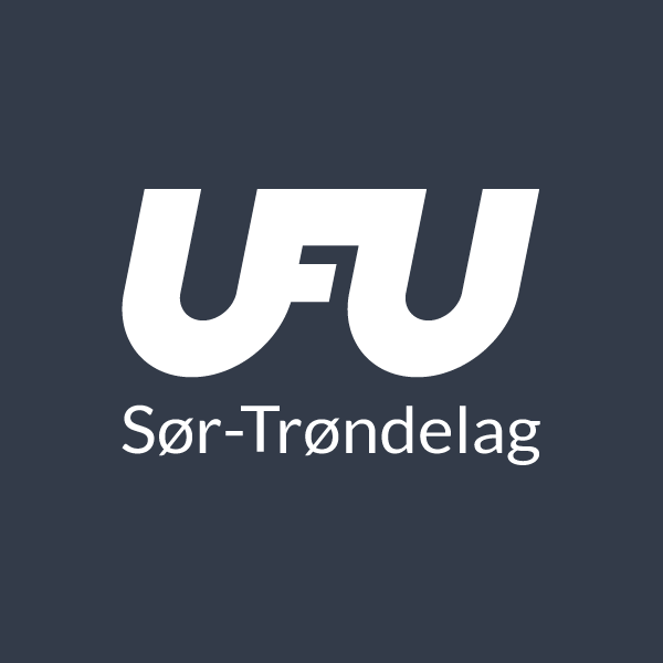 Ungdommens Fylkestuvalg i Sør-Trøndelags logo, utarbeidet av Webgutta.